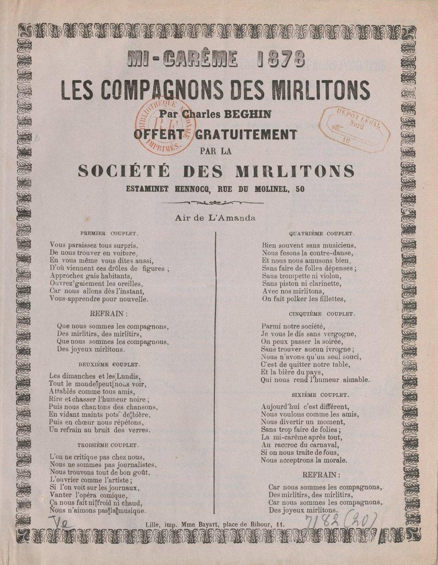 Une chanson de la Société des mirlitons publiée à l'occasion de la Mi-Carême 1878 à Lille.